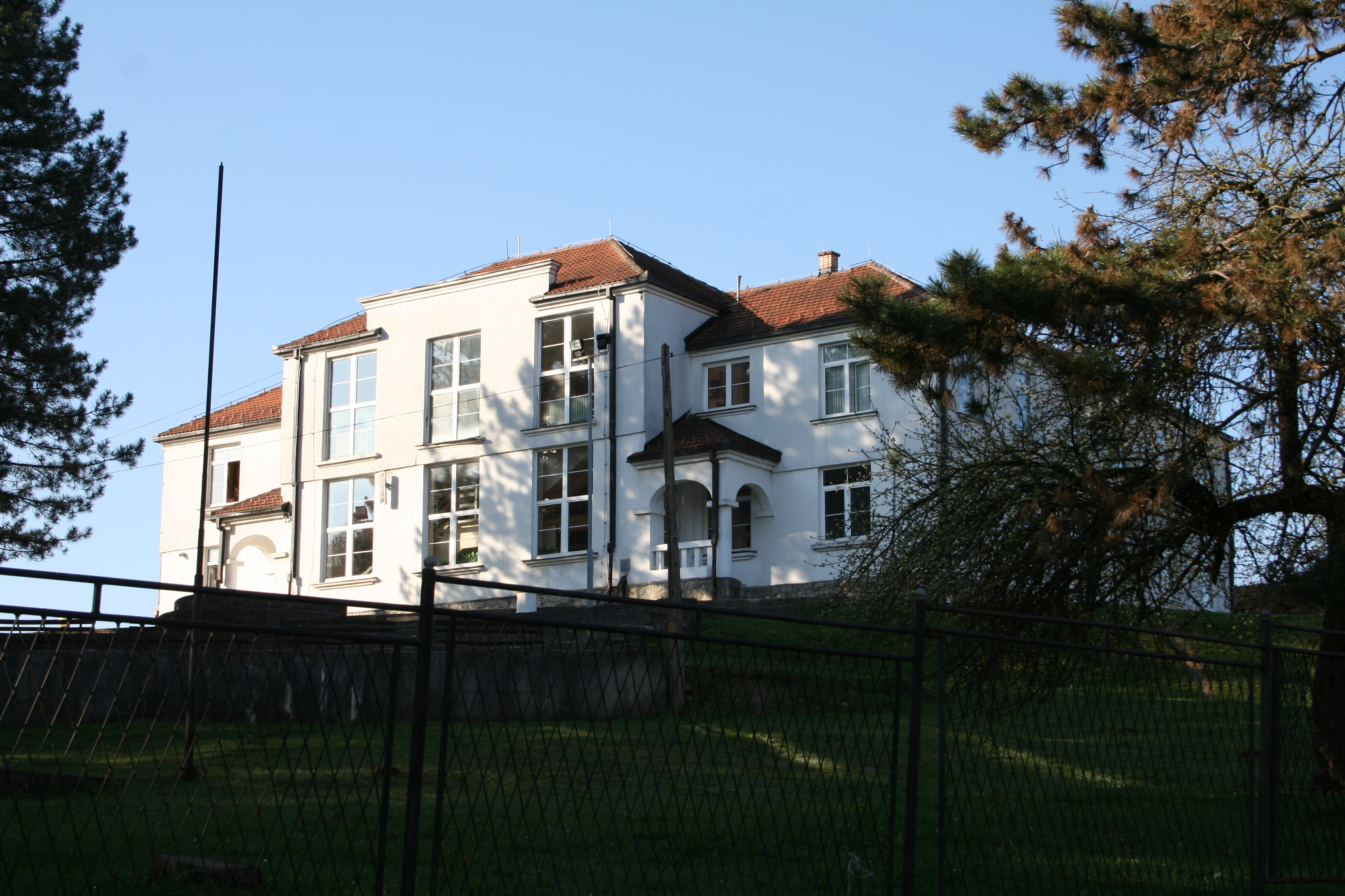 Zgrada škole, Kamenica